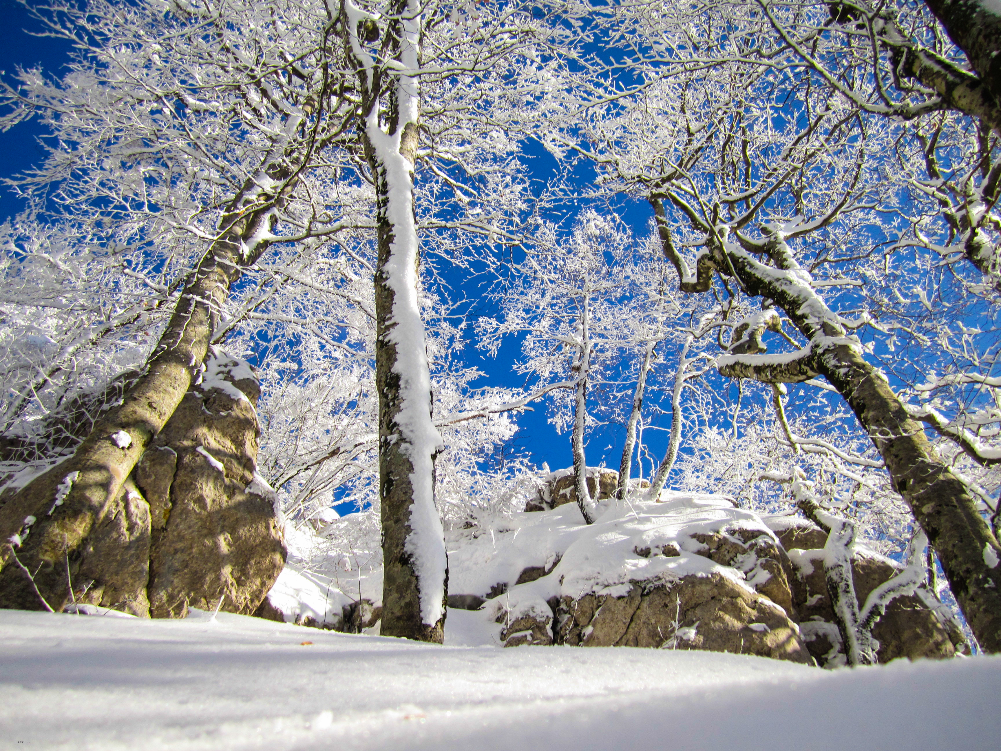 Mali i Dajtit, Tirane, Kruje